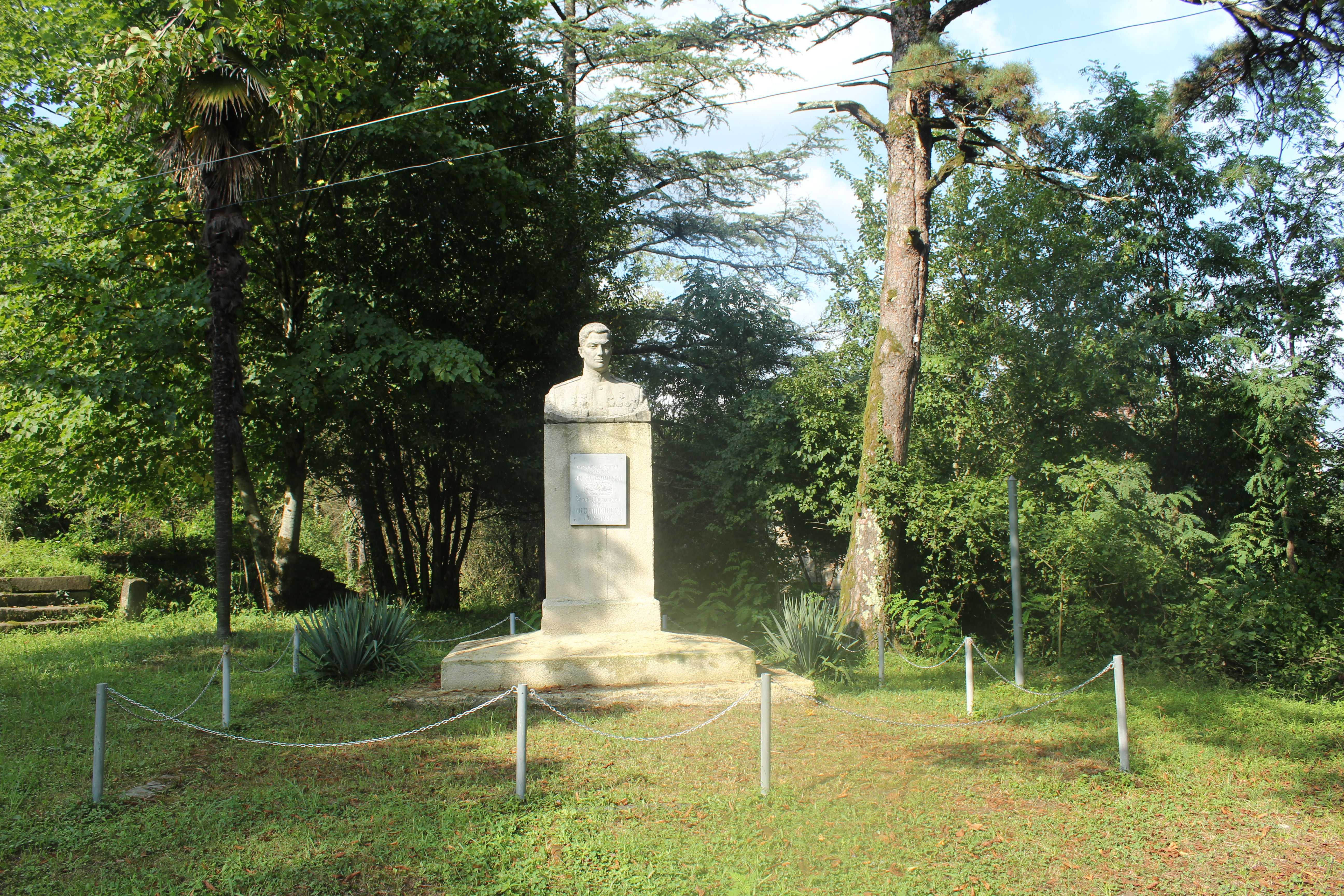 ჭიჭიკო ბენდელიანის ბიუსტი გორაბერეჟოულის ტყე-პარკში